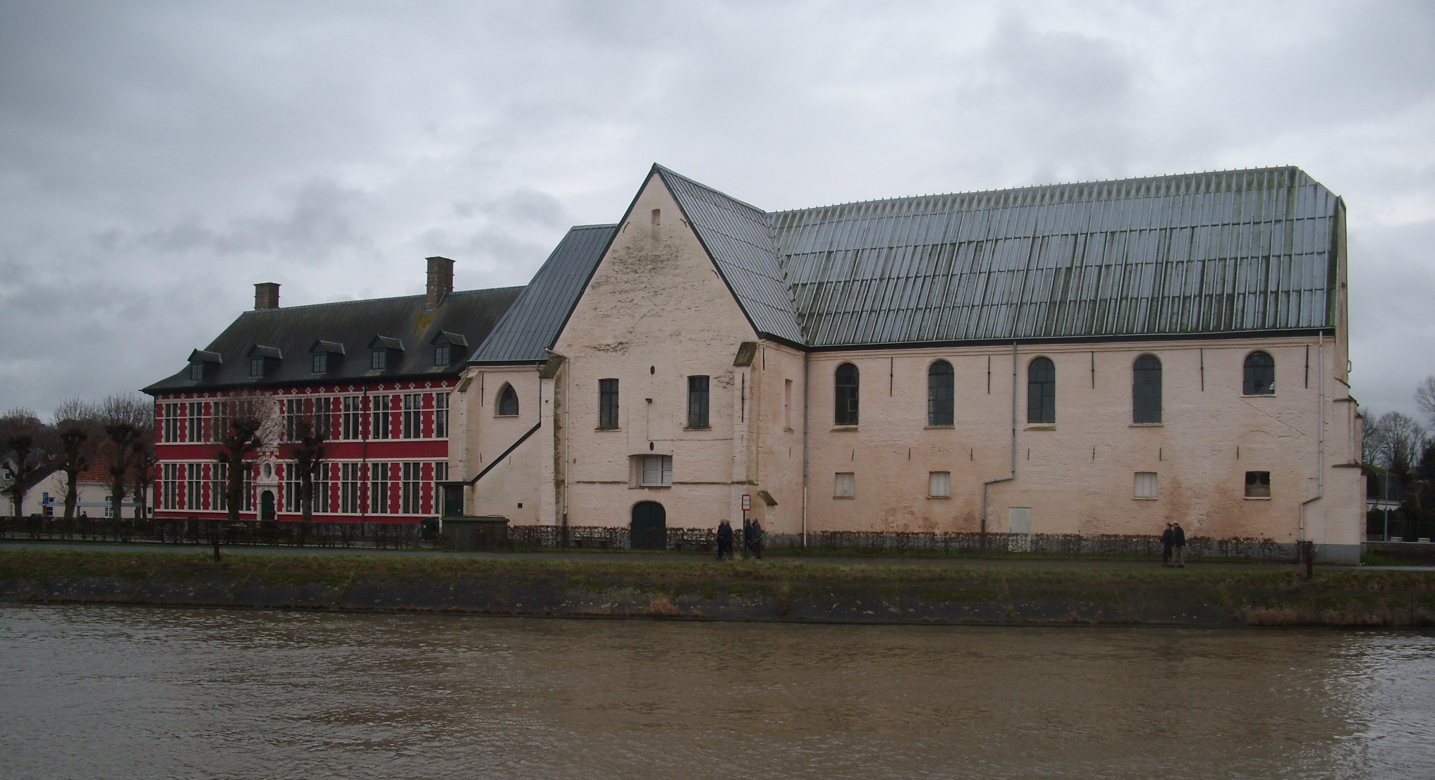 Maagdendaele - aan de Schelde - in Pamele - Oudenaarde - Oost-Vlaanderen - België